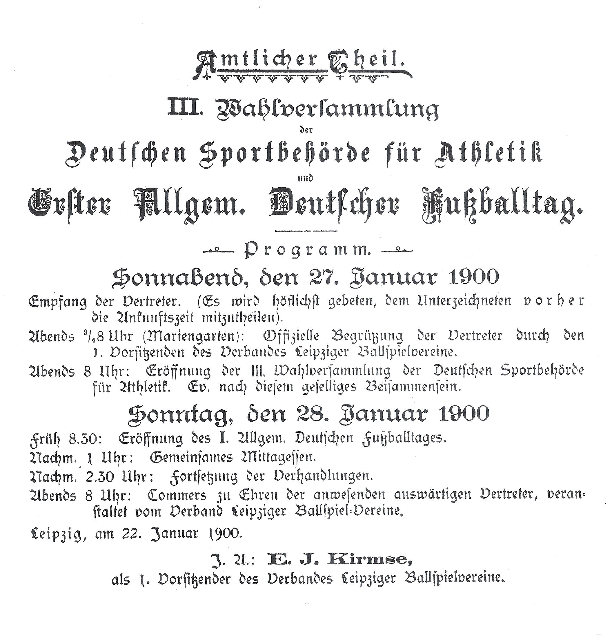 Programm, des "Ersten Allgemeinen Fußballtags" (28.1.1900 in Leipzig), der Gründungsversammlung des Deutsche Fußball-Bunds.